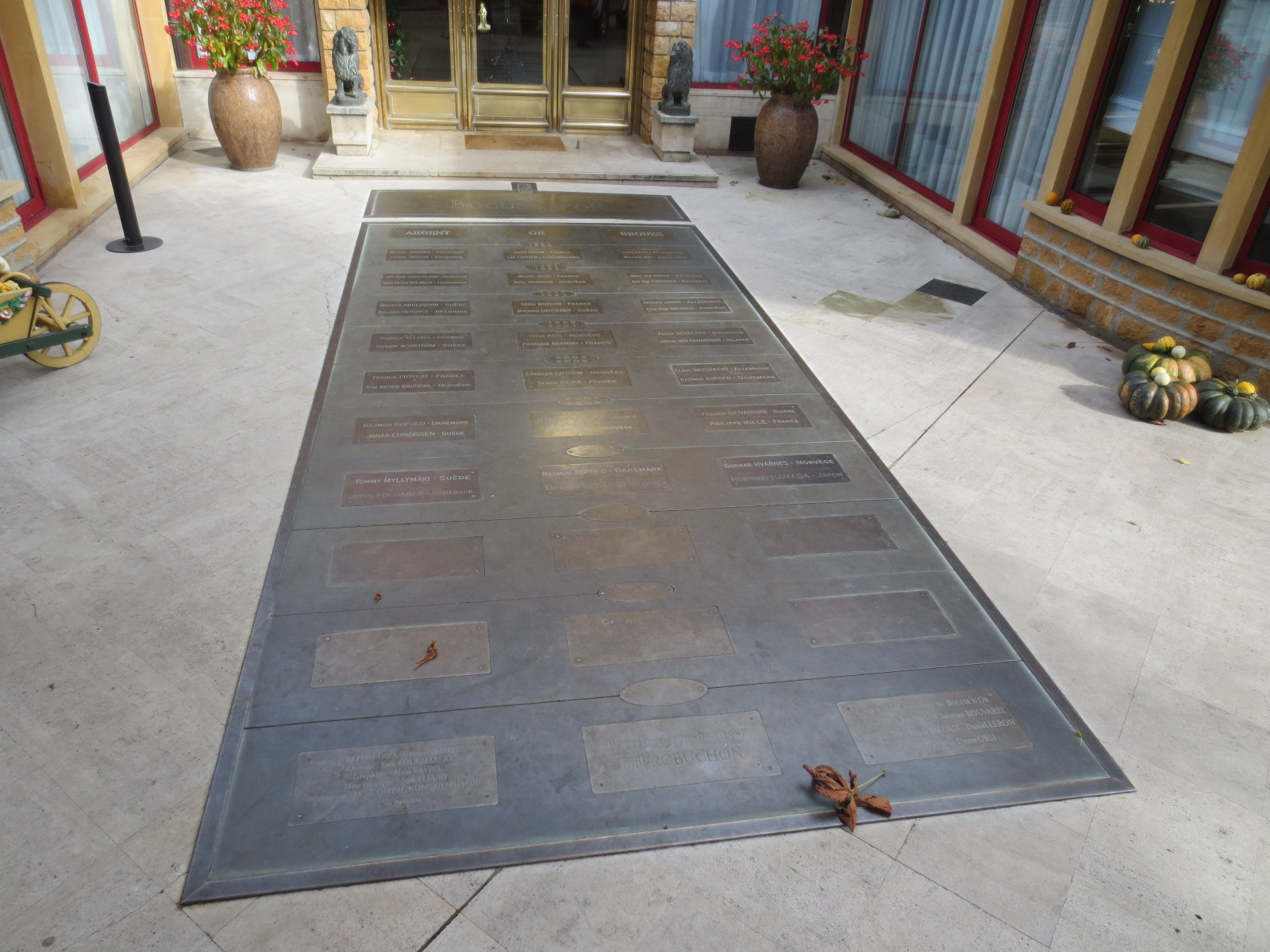 Lauréats des Bocuse d'Or devant la porte d'entrée de L’Auberge du Pont de Collonges de Paul Bocuse